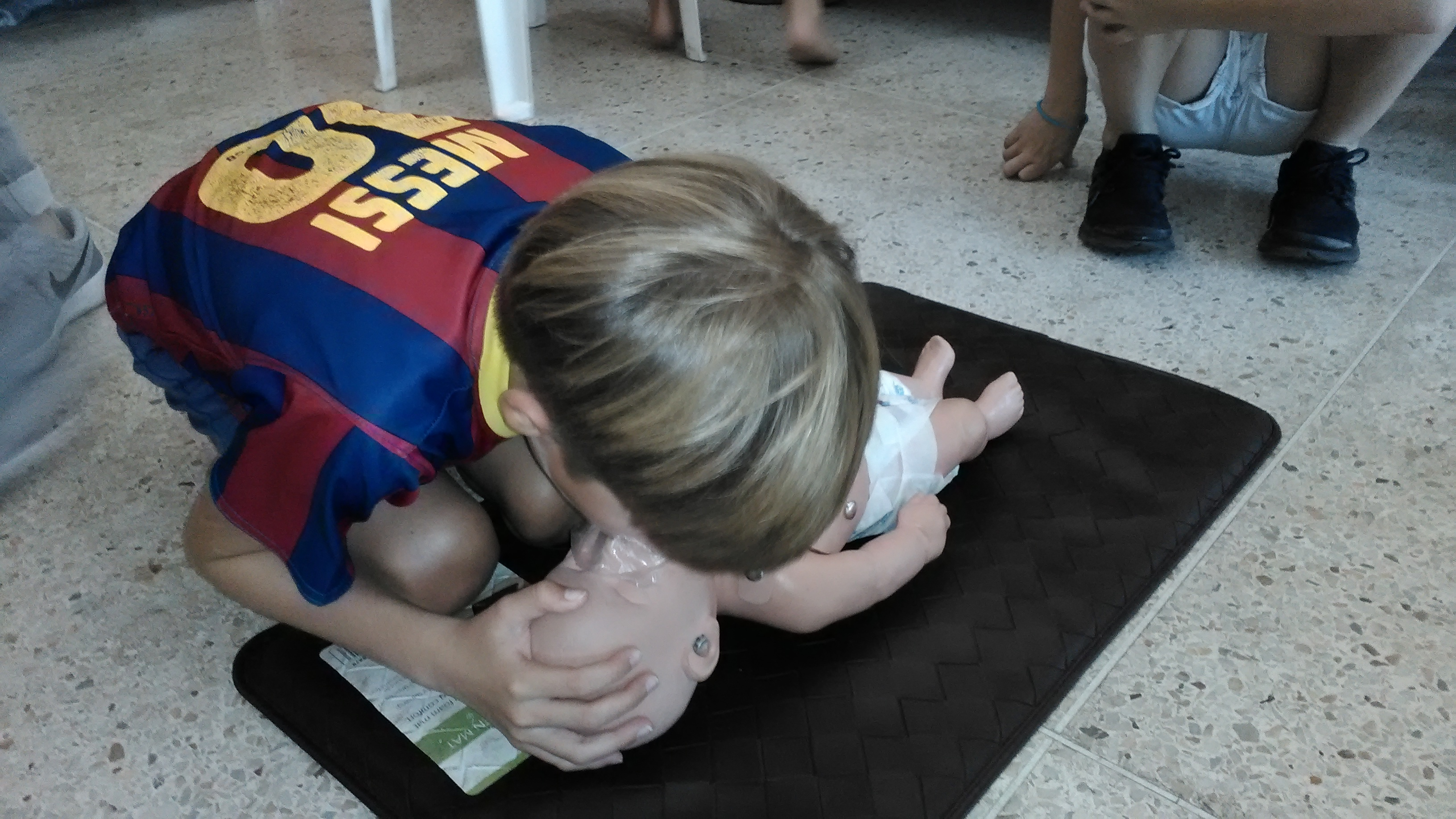 Ventilación realizada por niño en un maniquí de lactante